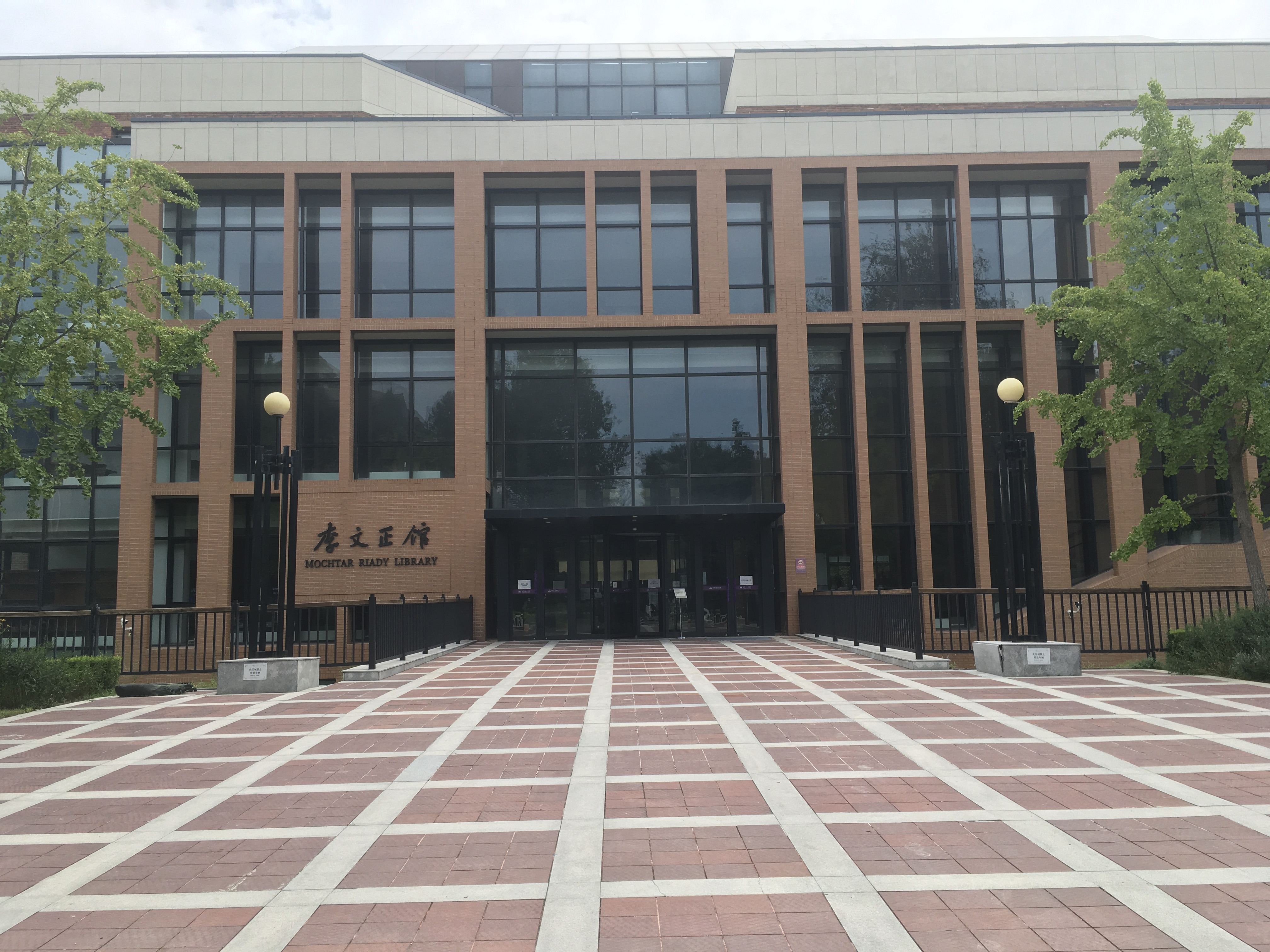 清華大學李文正館